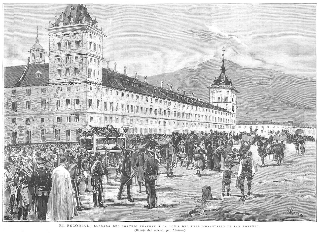 El Escorial, llegada del cortejo fúnebre del rey Alfonso XII a la loja del Real Monasterio de San Lorenzo, grabado publicado en la revista española La Ilustración Española y Americana.